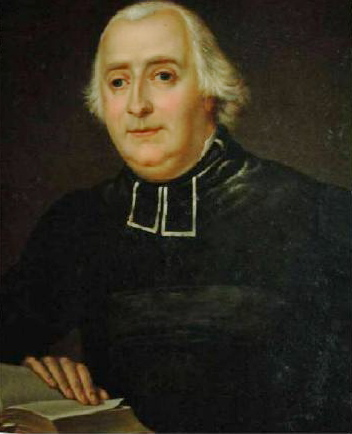 Abbé Carron (1760-1821)